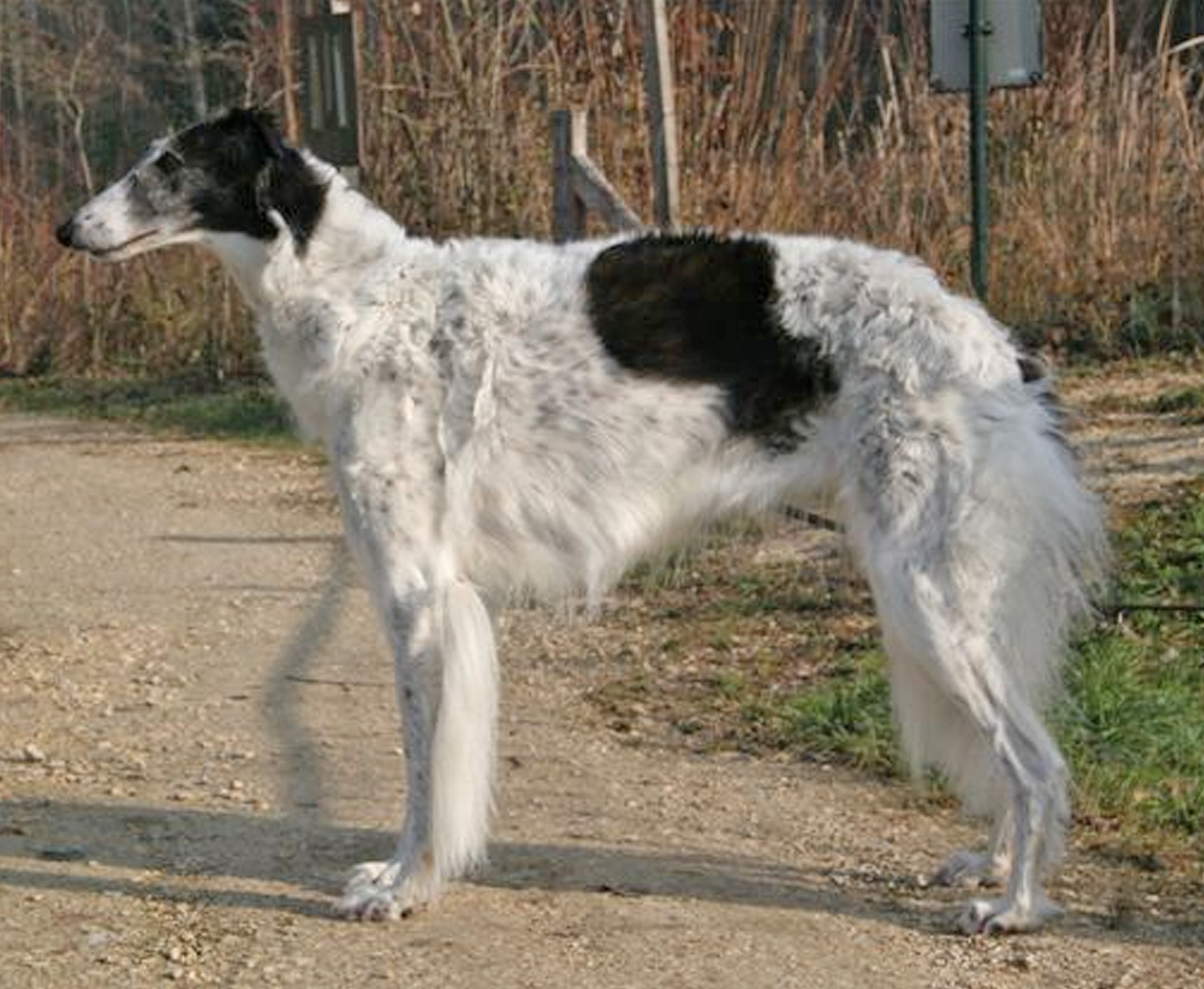 Rjaska v. Kaluga, propr. Barbara Wickli